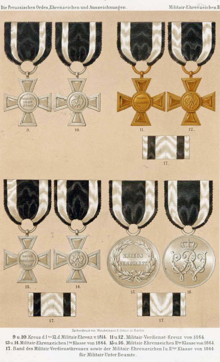 Das Militaer-Ehrenzeichen Ehrenkreuze